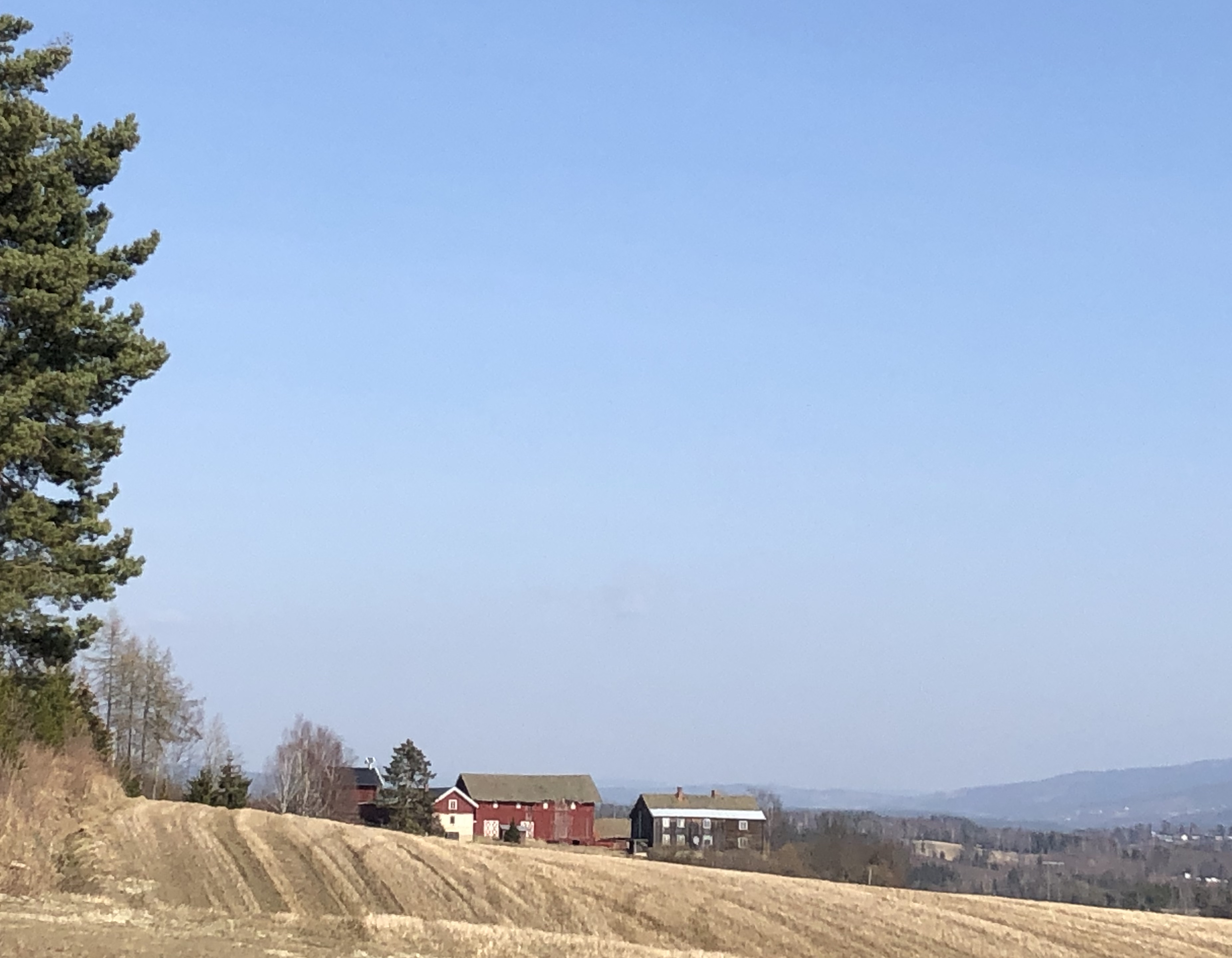 Øvre Lerberg gård, Sandakerveien 407, Ringerike